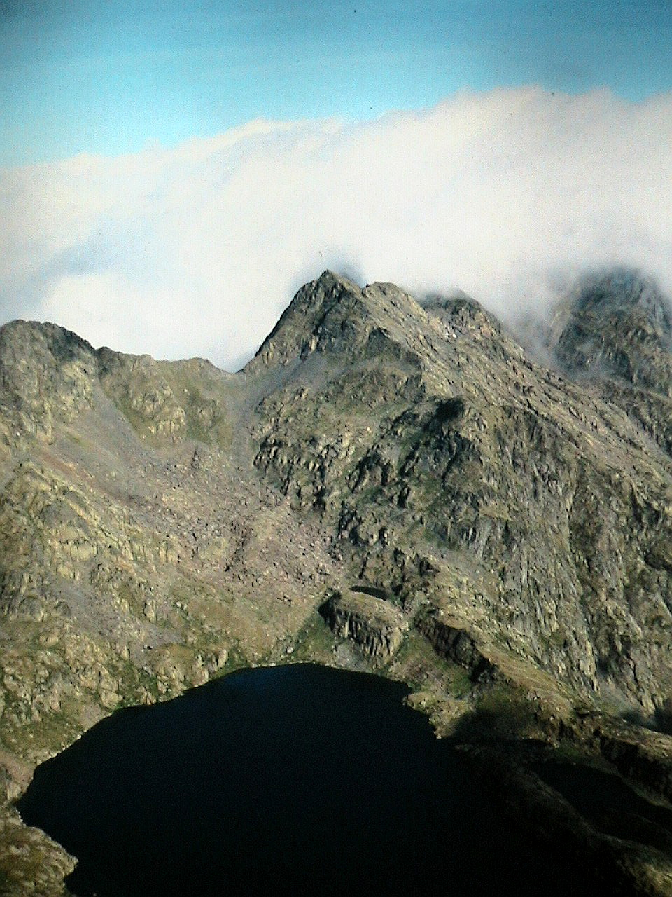 Les boires, a la dreta, tapen parcialment el Mont-roig. Al centre el Pic de la Galina, i, a baix, l'Estany Major de la Gallina. Des del Ventolau. Capçalera de la vall d'Unarre (Pallars Sobirà). Foto presa de la projecció d'una diapositiva